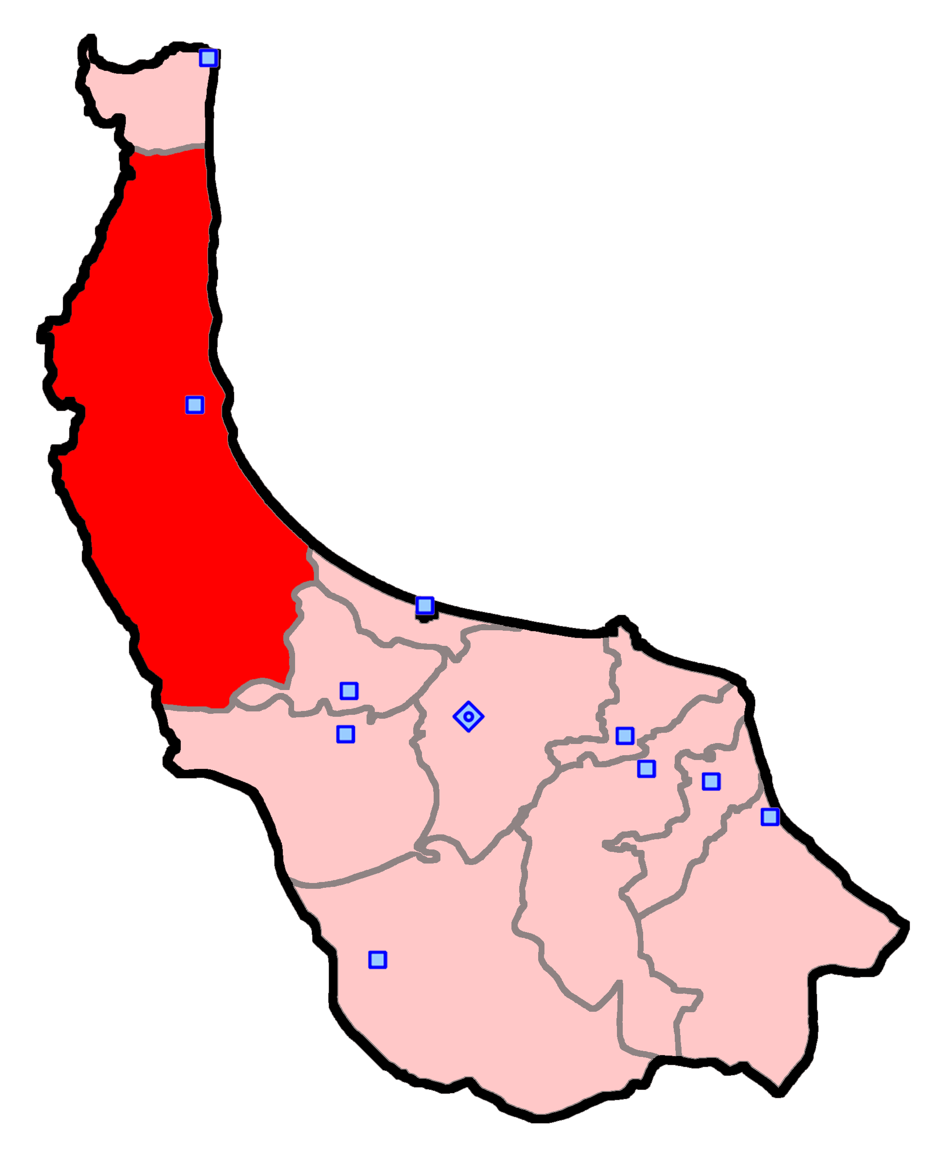 تالش، رضوانشهر و ماسال برای انتخابات مجلس شورای اسلامی